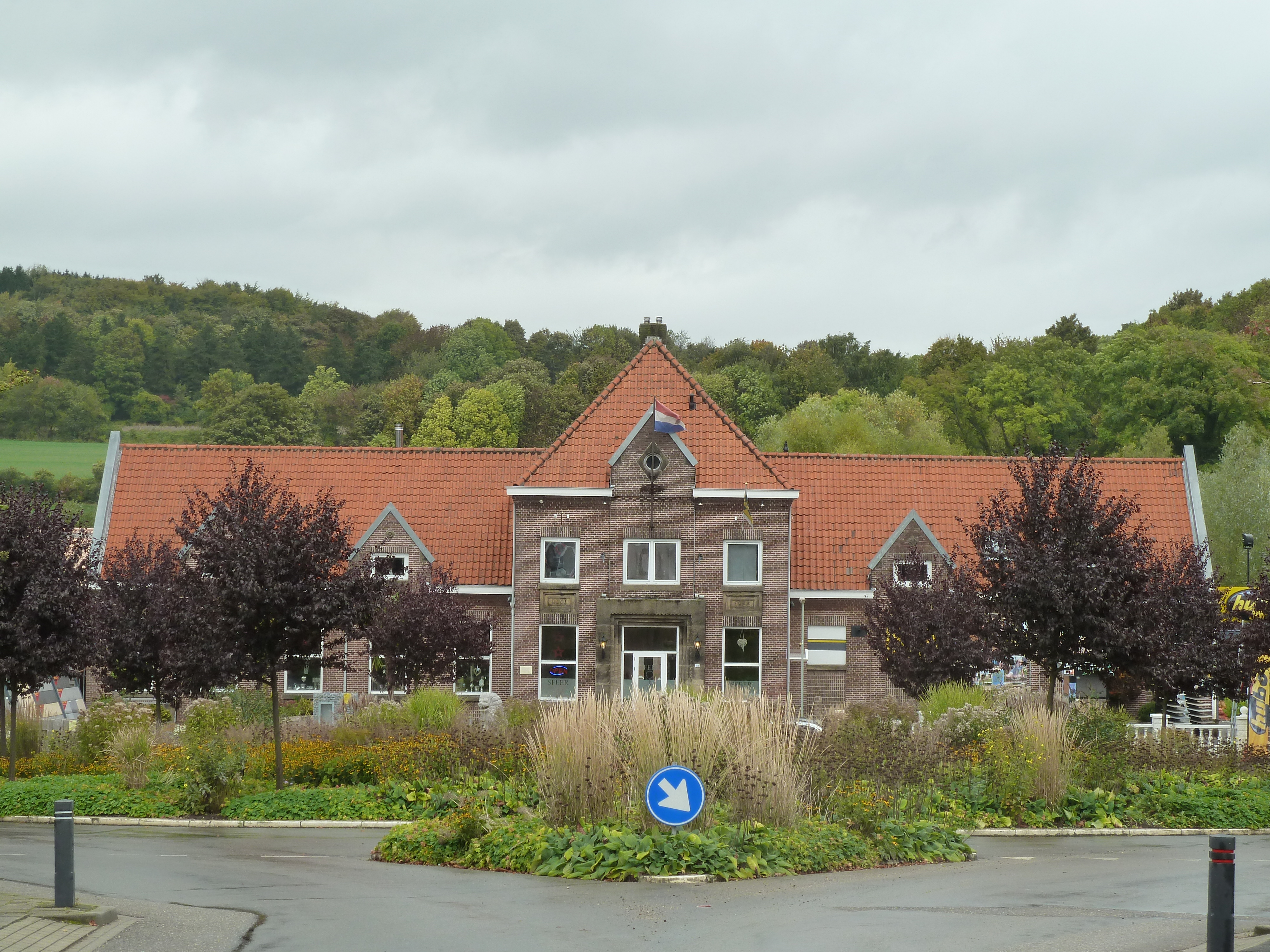 Station Vaals, onderdeel van de opgeheven tramlijn Maastricht-Vaals, Limburg, Nederland